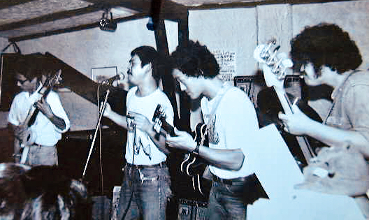 1980年頃 渋谷 屋根裏でのライブ写真